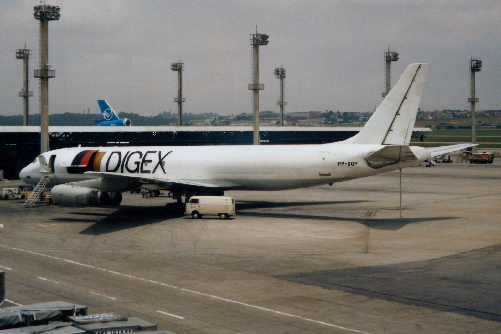 São Paulo - Guarulhos International (Cumbica) (GRU / SBGR) 5.1997